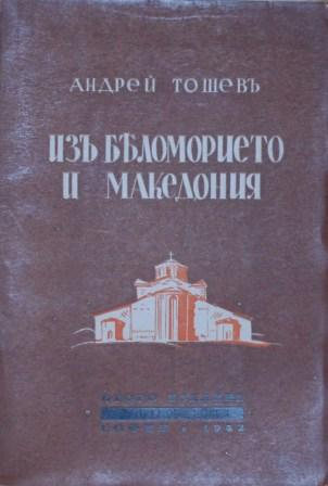 "Из Беломорието и Македония"